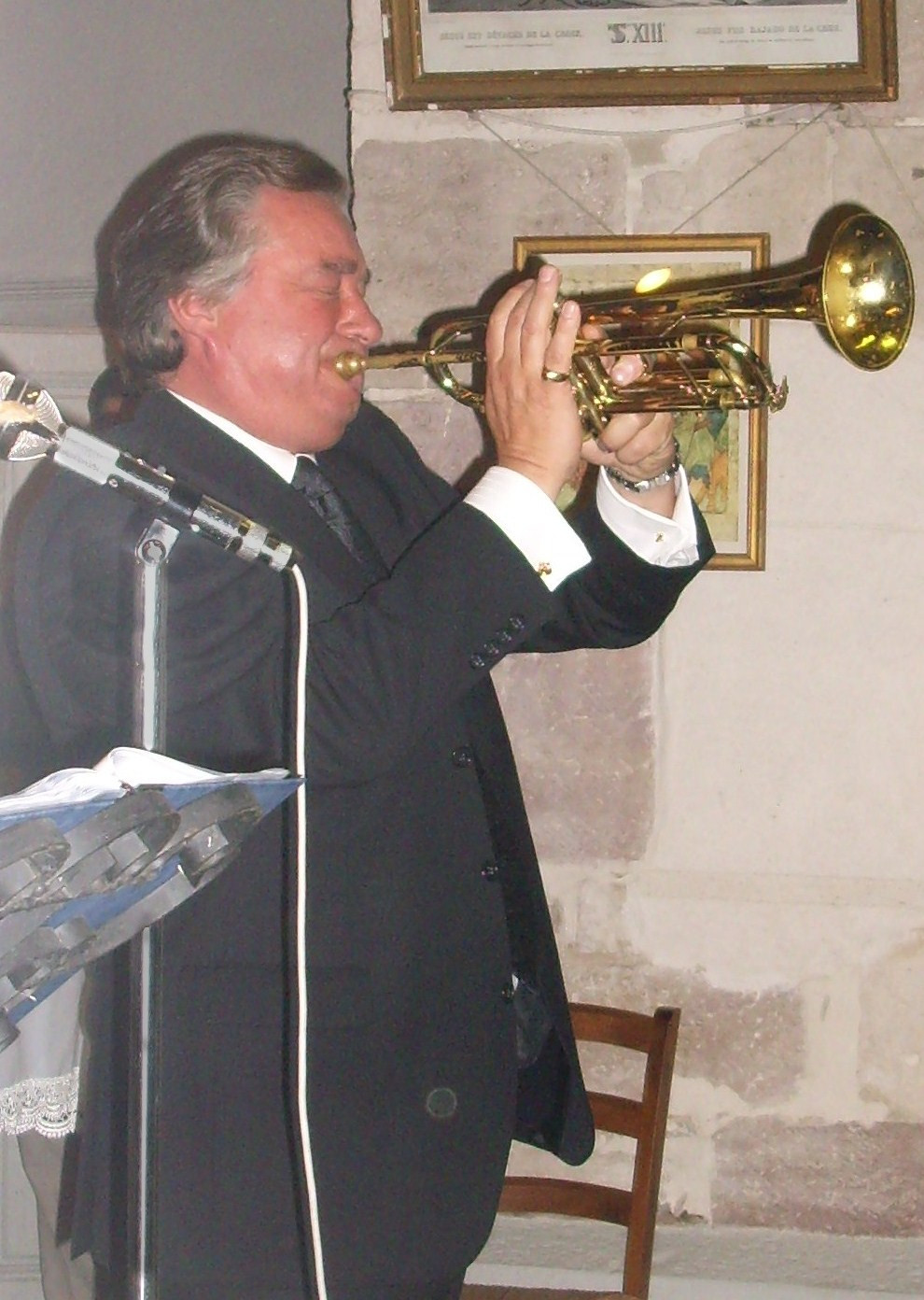 Photos de Jean-Claude Borelly lors d'un mariage à Saint Martin-sous-Montaigu